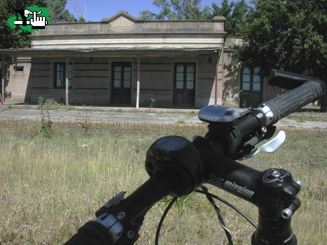 Estación Ariel del ex_FCPBA